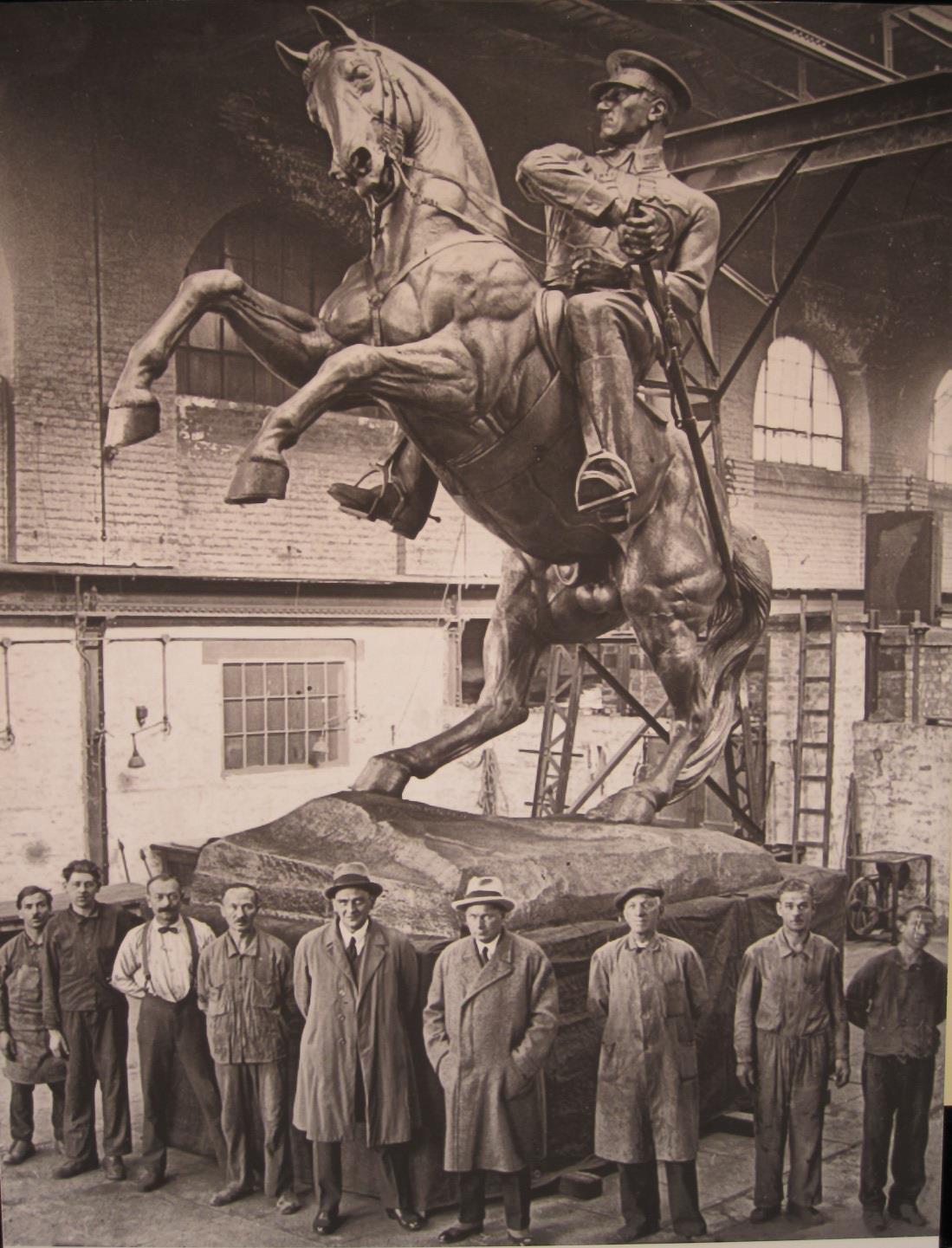 Onur Anıtı döküldüğü Viyana'nın Vereinigte Metallwerke dökümhanesinde.